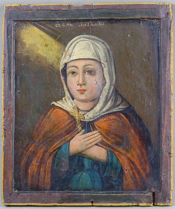 Икона «Святая Муч.Татьяна», дерево, масло, 27 × 23 см, нач.XIX в.